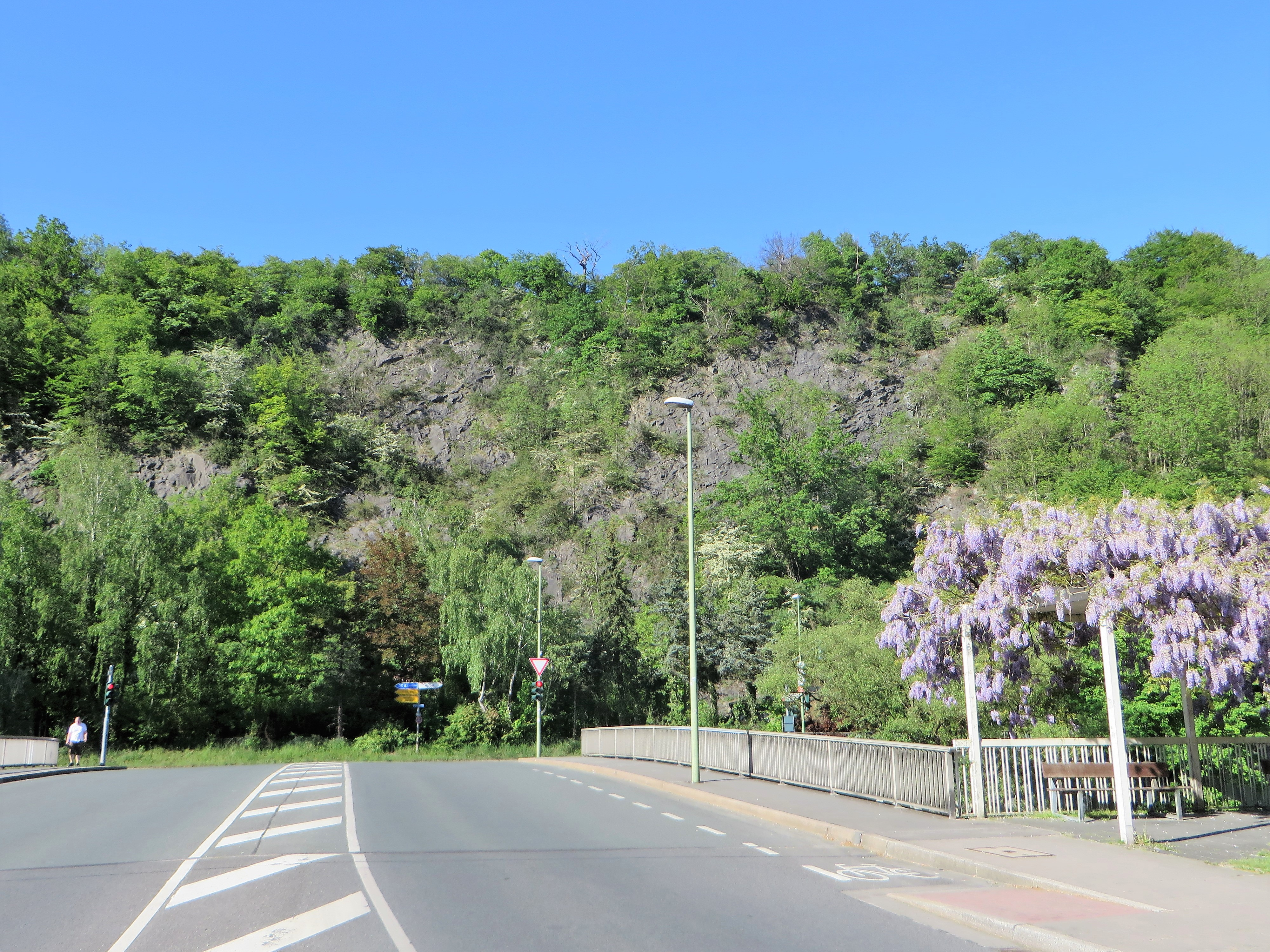 Blick über die Lennebrücke auf den „Oeger Stein“ im Naturschutzgebiet Steltenberg (NSG-HA-019) in Hagen-Hohenlimburg. Am Steilhang zur Lenne befinden sich mehrere geologische und auch archäologisch bedeutsame Höhlen, z.B. die Oeger Höhle (39 m), Dr.-Wolf-Höhle (161 m) und Seegrotte (159 m).